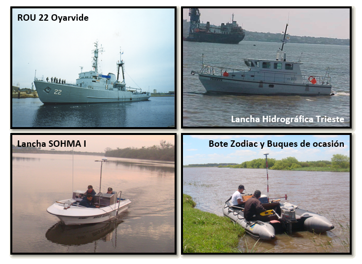 Embarcaciones Hidrograficas